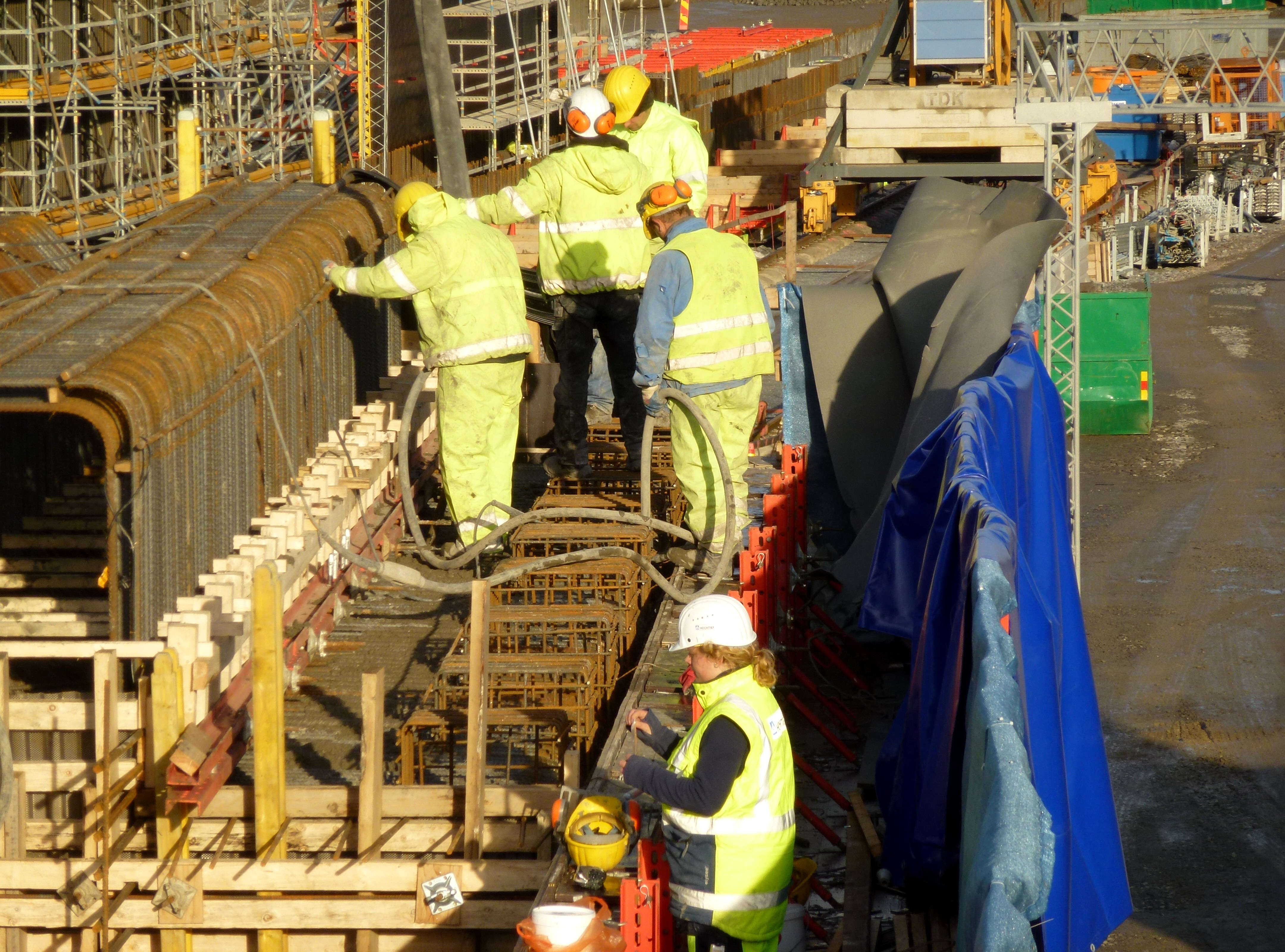 Från byggarbetena för nya Hagastaden 31 okt 2012